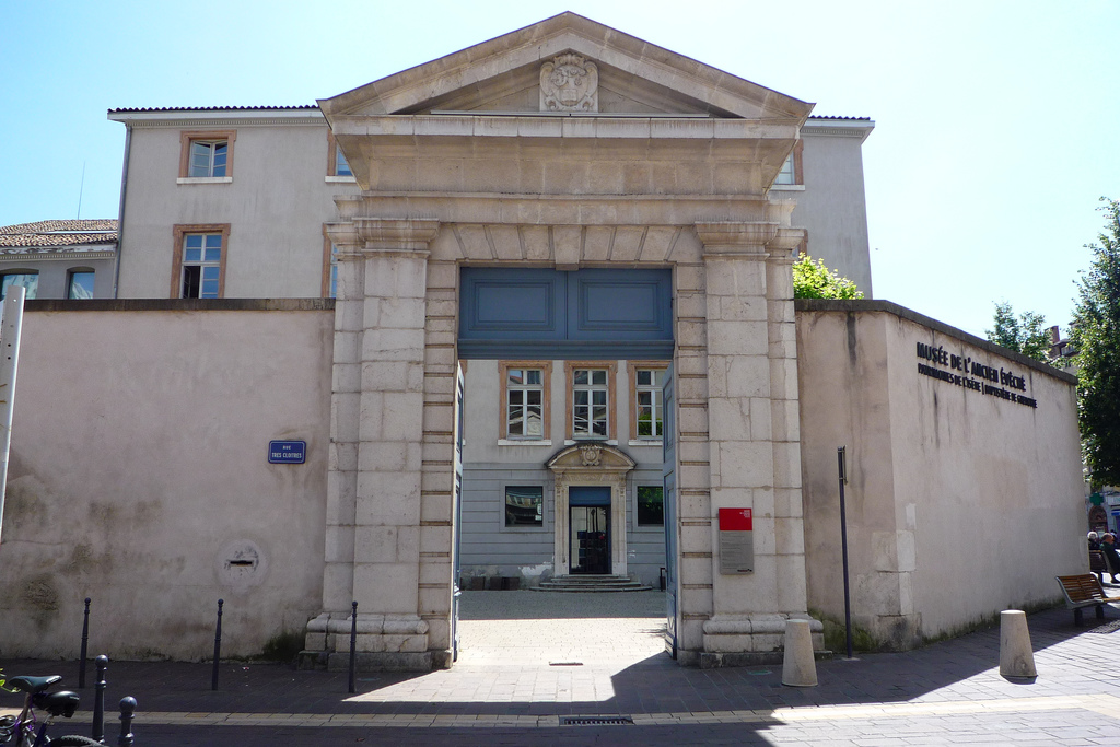 entrée musée ancien évêché, rue Très-Cloitre à Grenoble